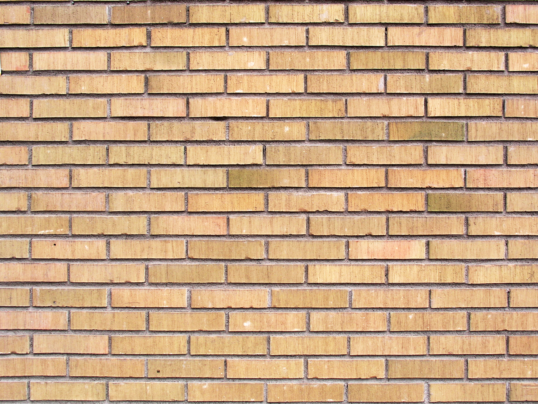 Arvika, Sweden. Brick wall, löpförband.